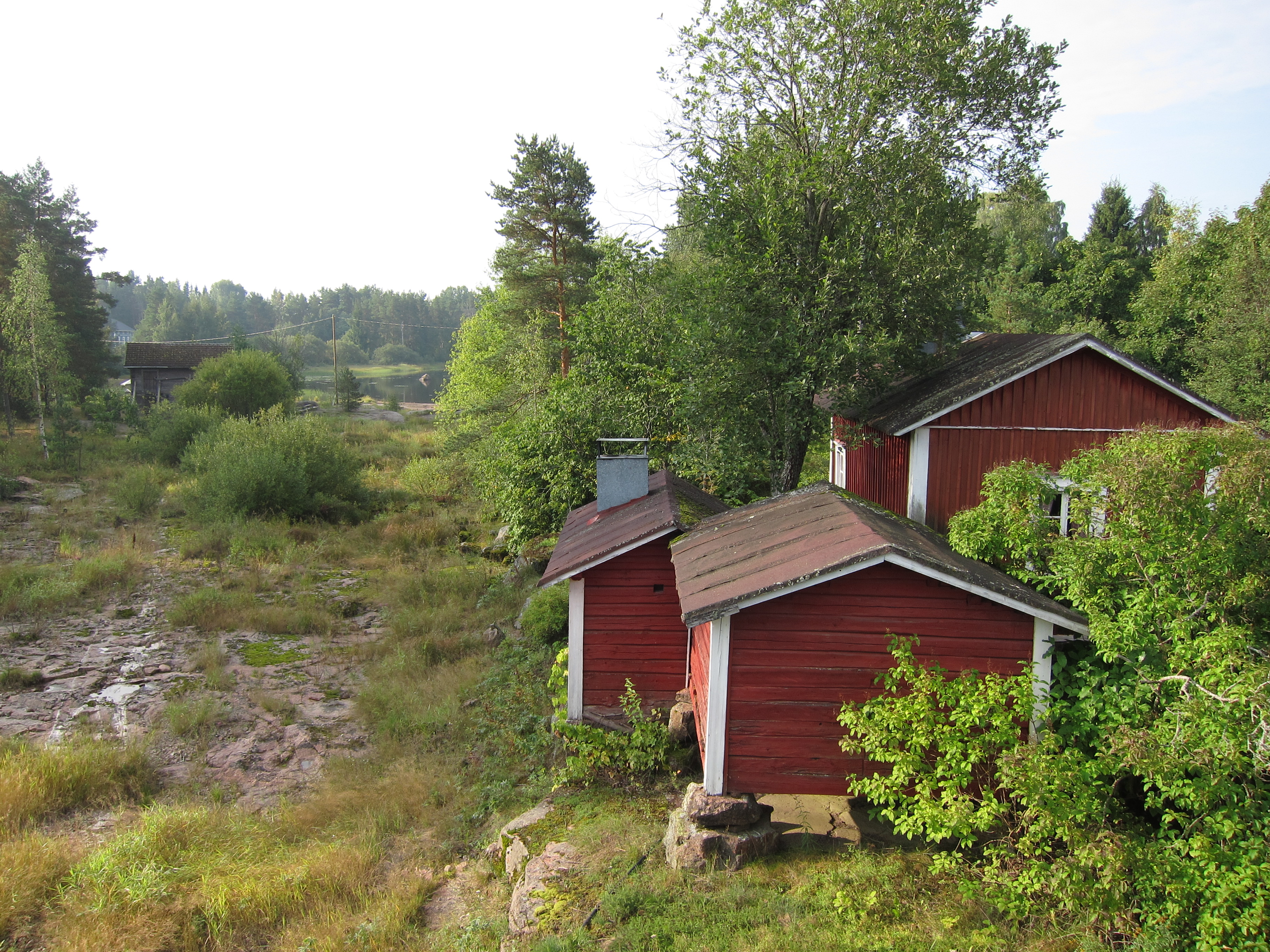 Näkymä Hurskosken alueelta Kotkan Hurukselan kylästä.